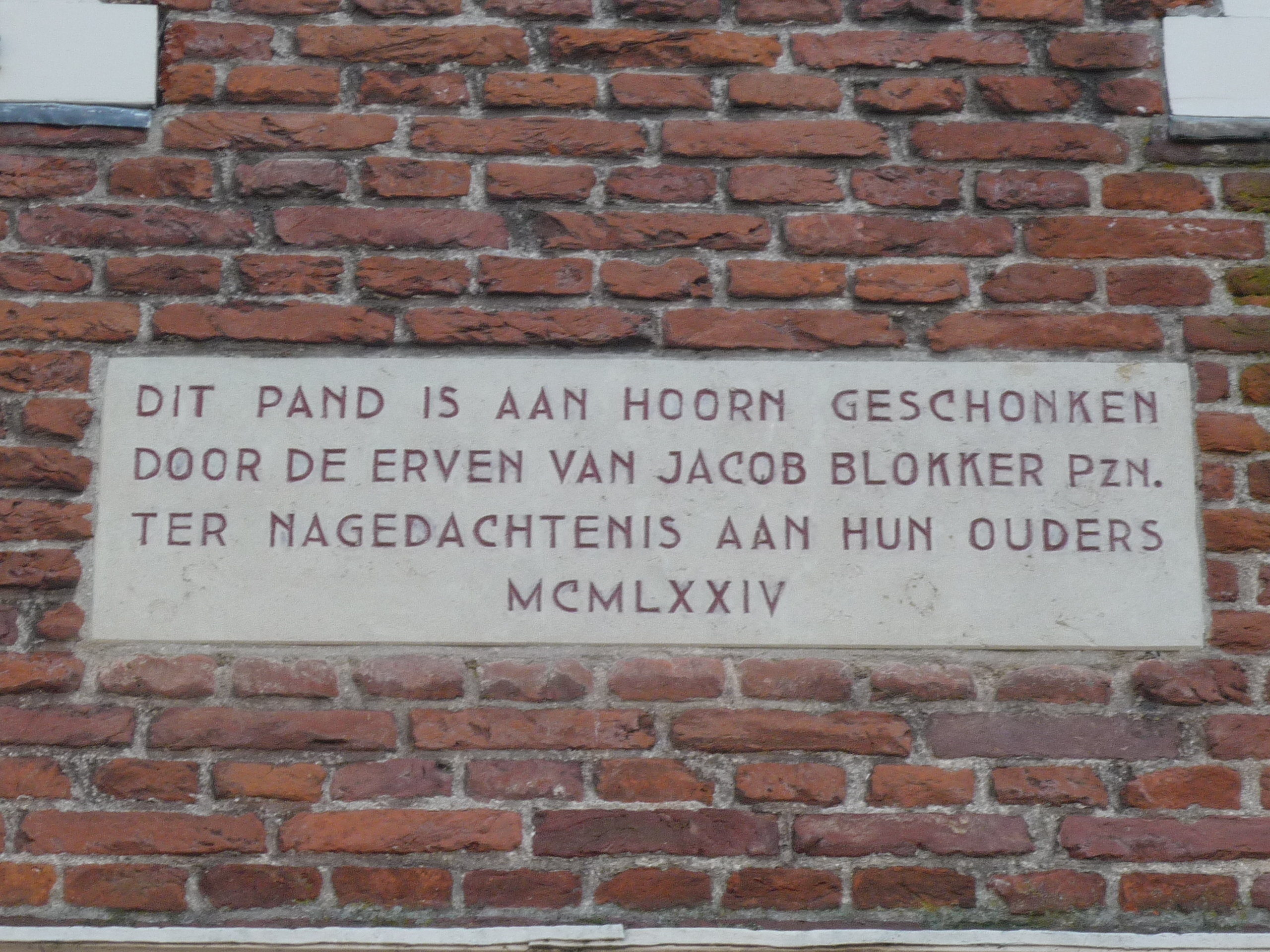 Adres: Breed 12 te Hoorn, Noord-Holland. In 1974 is het pand aan de vereniging Oud Hoorn geschonken door de familie Blokker.